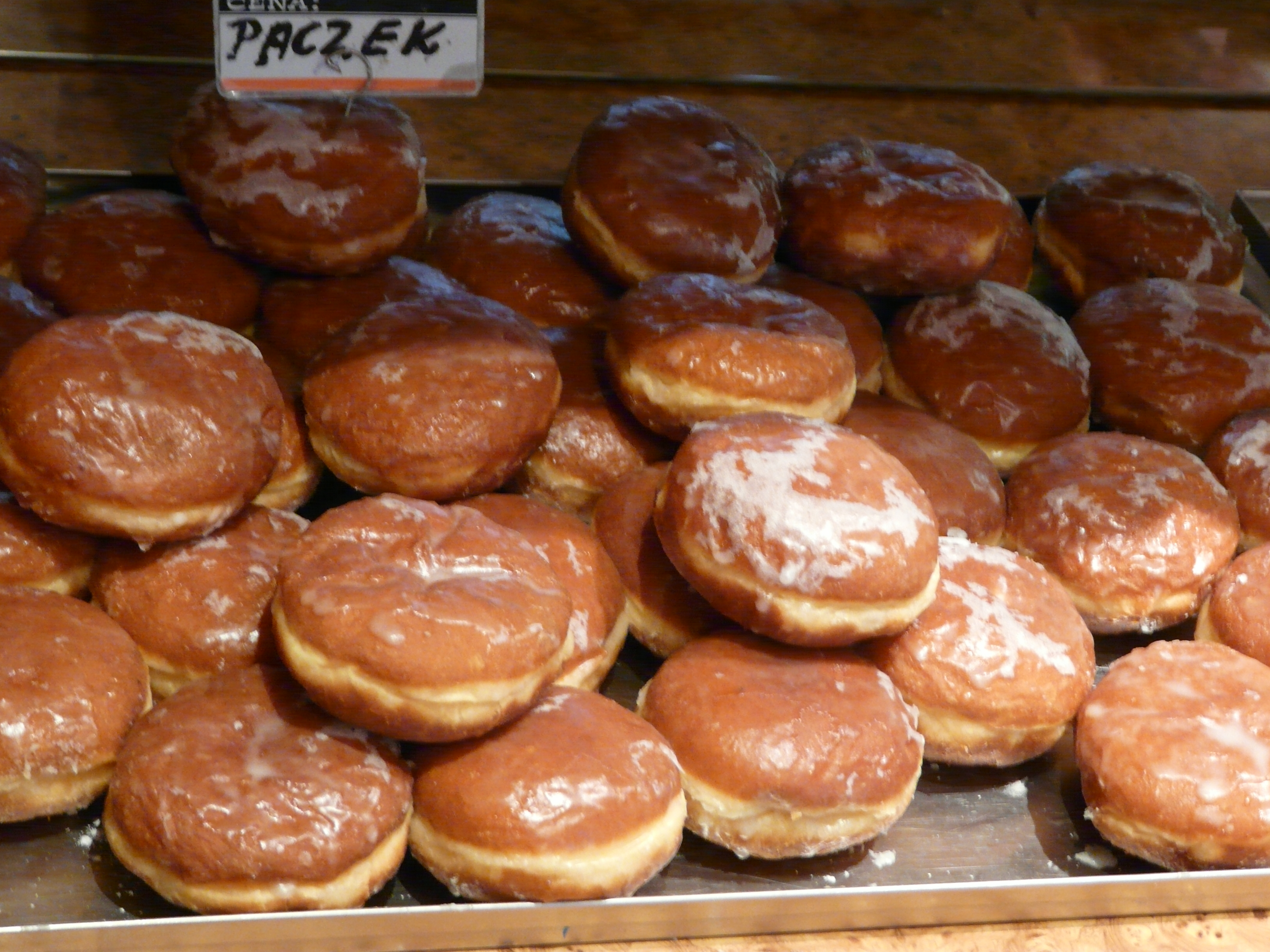 Kuvassa munkkeja.